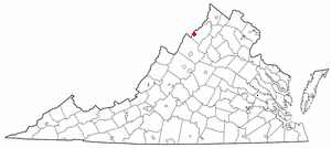 va maps